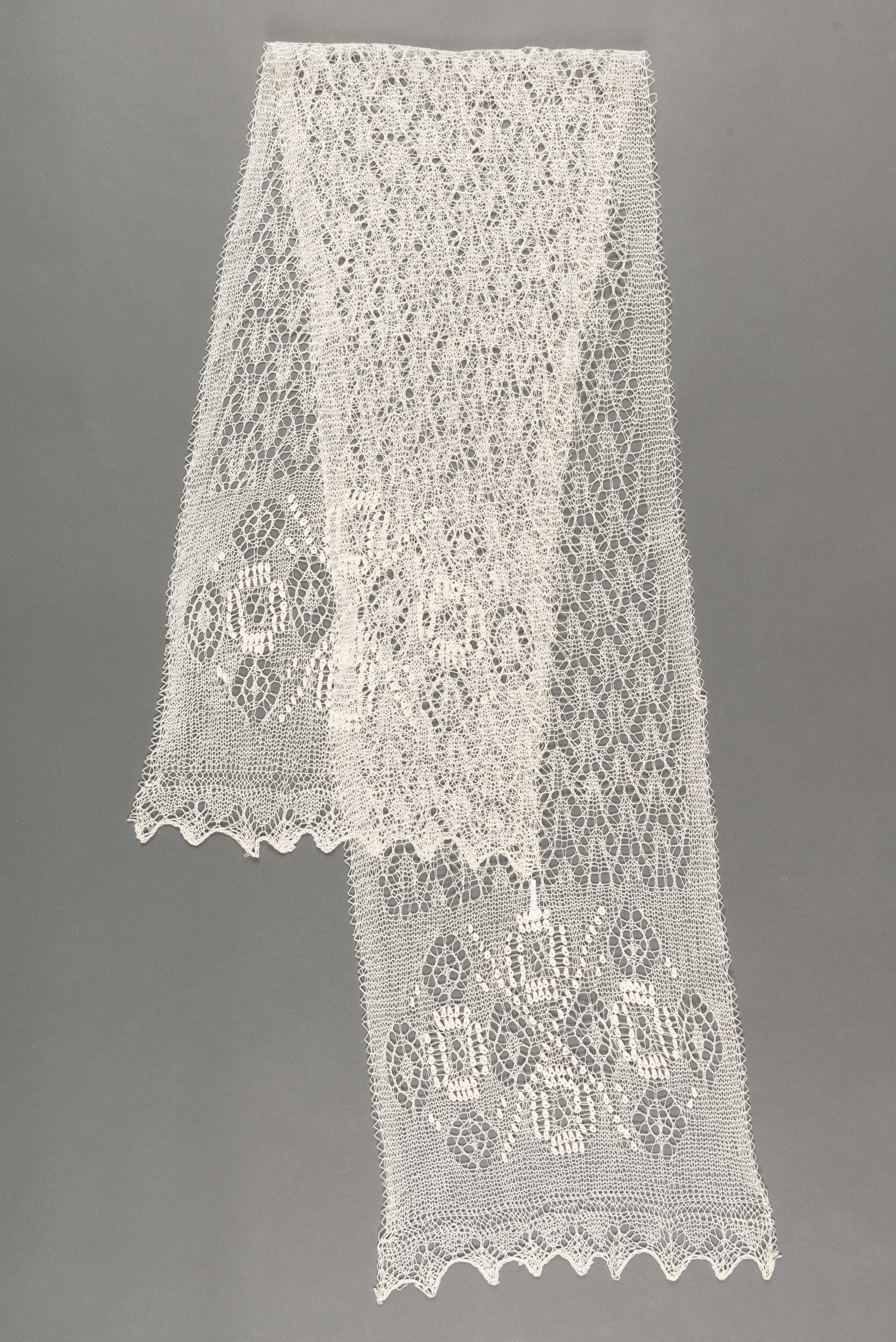 Nimetus sall, haapsalu pits Hinnang museaali kultuuriväärtuse kohta Traditsiooniliste Eesti mustrite ja käsitöövõtete edasiarendamine. (06.11.2018) Olemus sall Dateering ligikaudu .1999 Originaal originaal Seisund hea Eraldatavad osad Tehnika pitskude (haapsalu pits) Materjal puuvill Värvus valge Mõõdud laius: 36.0 cm (maksimaalne); pikkus: 184.0 cm (maksimaalne) Vähem « Lisaklassifitseering Topograafiline ERM: Haapsalu legend Kootud 1990. aastate lõpus. Keskel nn lehemuster, otsad Linda Elgase enda välja mõeldud. füüsiline kirjeldus Valgest peenest puuvillasest lõngast haapsalu pitskoes ristkülikukujuline sall, millel keskosas nn lehemuster ja otsades nuppudest moodustatud motiivid ning sakiline äärepits. 2018 muuseumi kogumistegevus Eesti Haapsalu kasutaja/omanik: Elgas, Linda üleandja: Elgas, Linda ligikaudu.1999 valmistamine Eesti Haapsalu valmistaja: Elgas, Linda ligikaudu.1999 riietumine ja lisandid Eesti Haapsalu